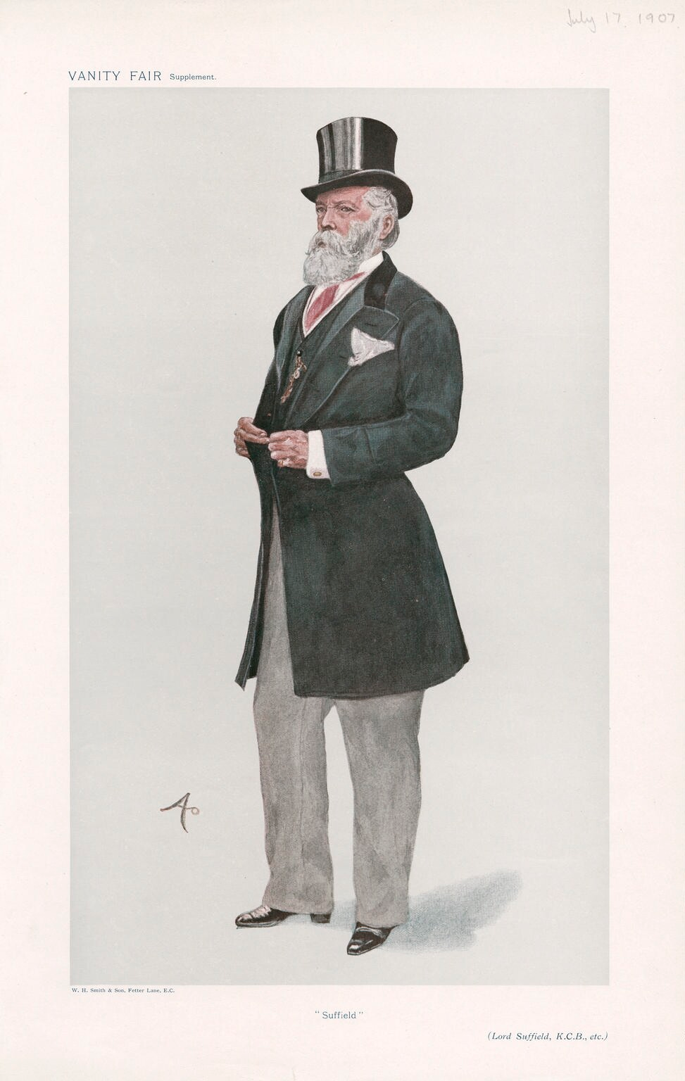 Lord Suffield